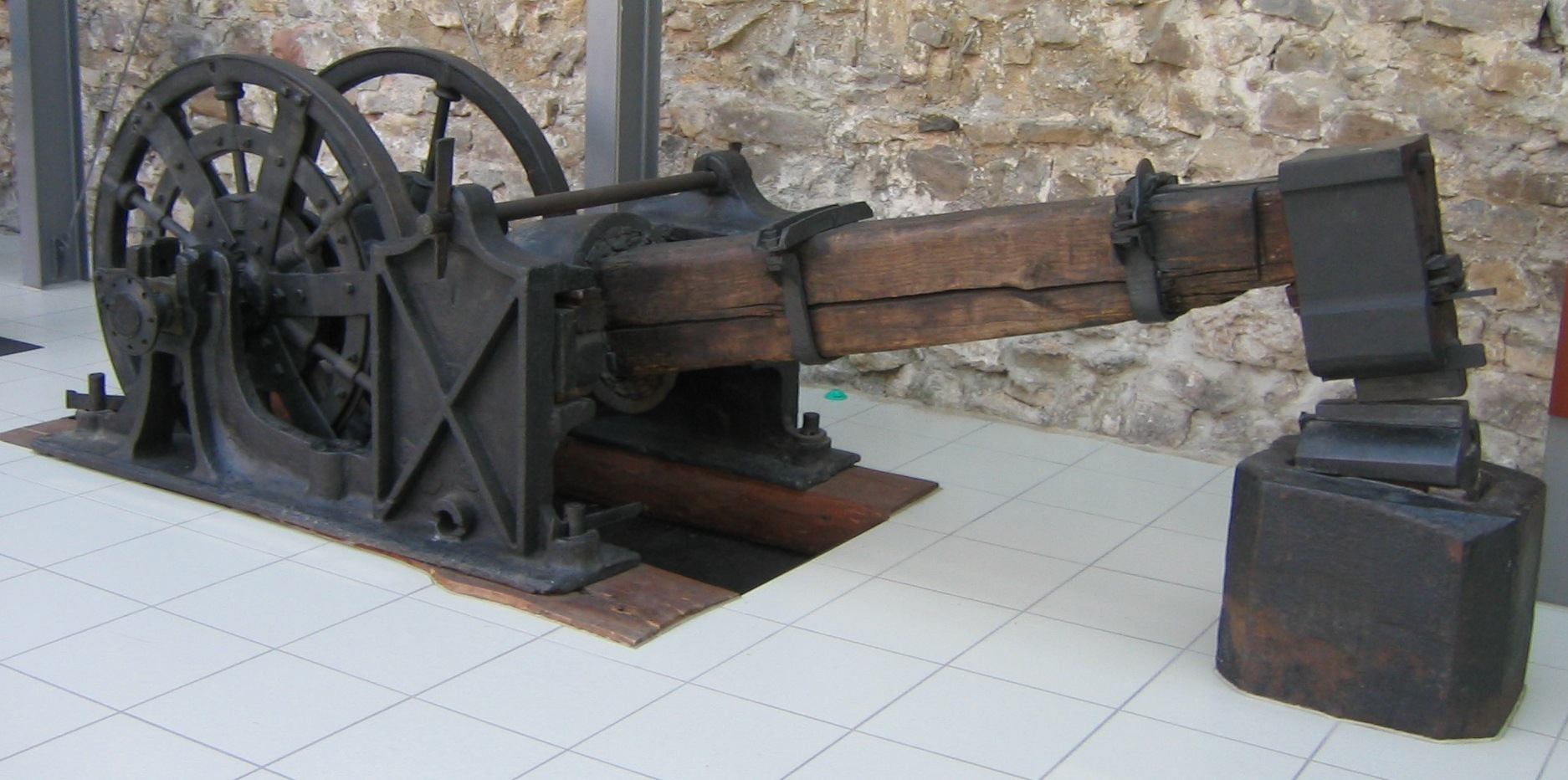 Schwanzhammer im Franziskanermuseum, Villingen, Deutschland